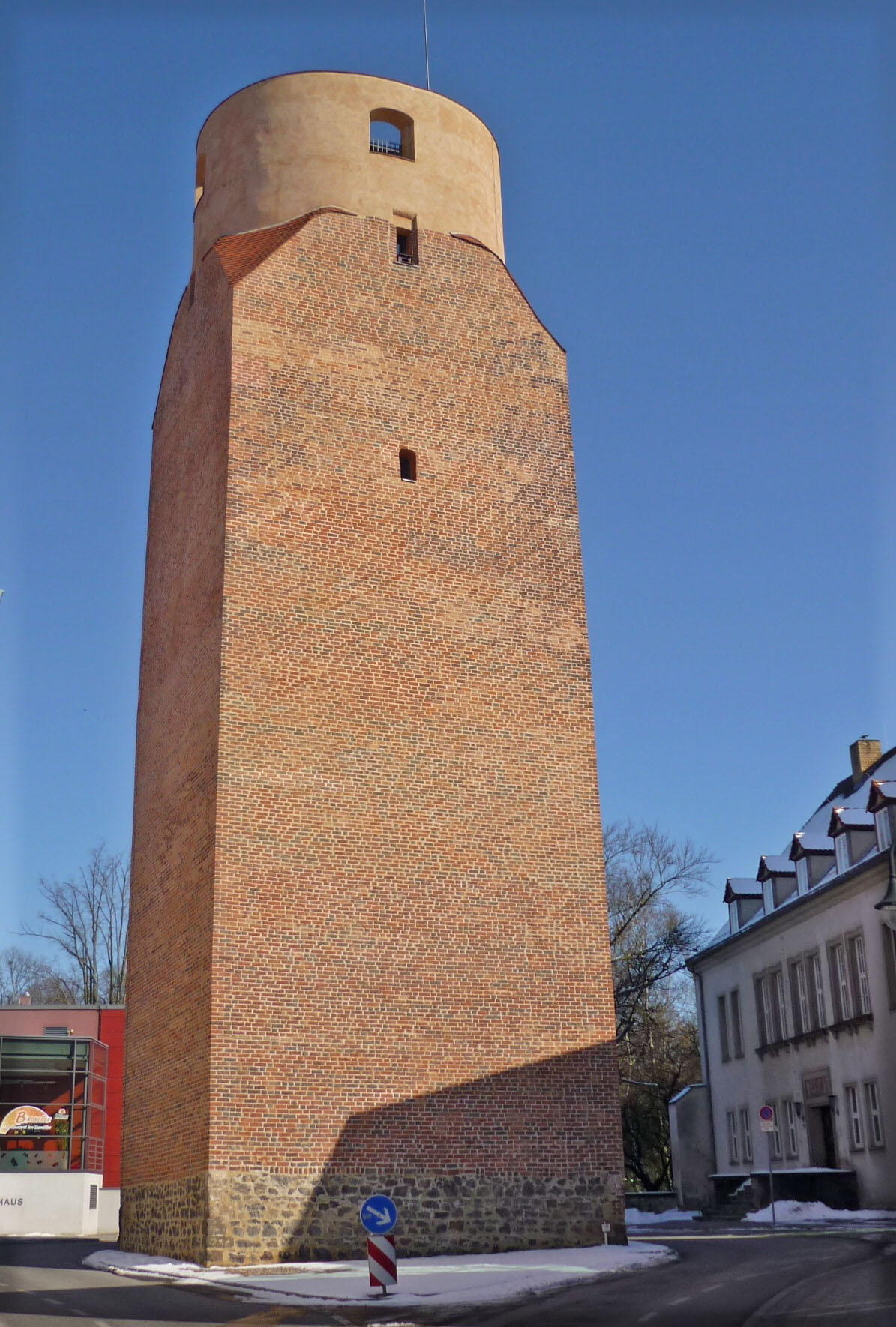 BadLiebenwerda, Lubwartturm